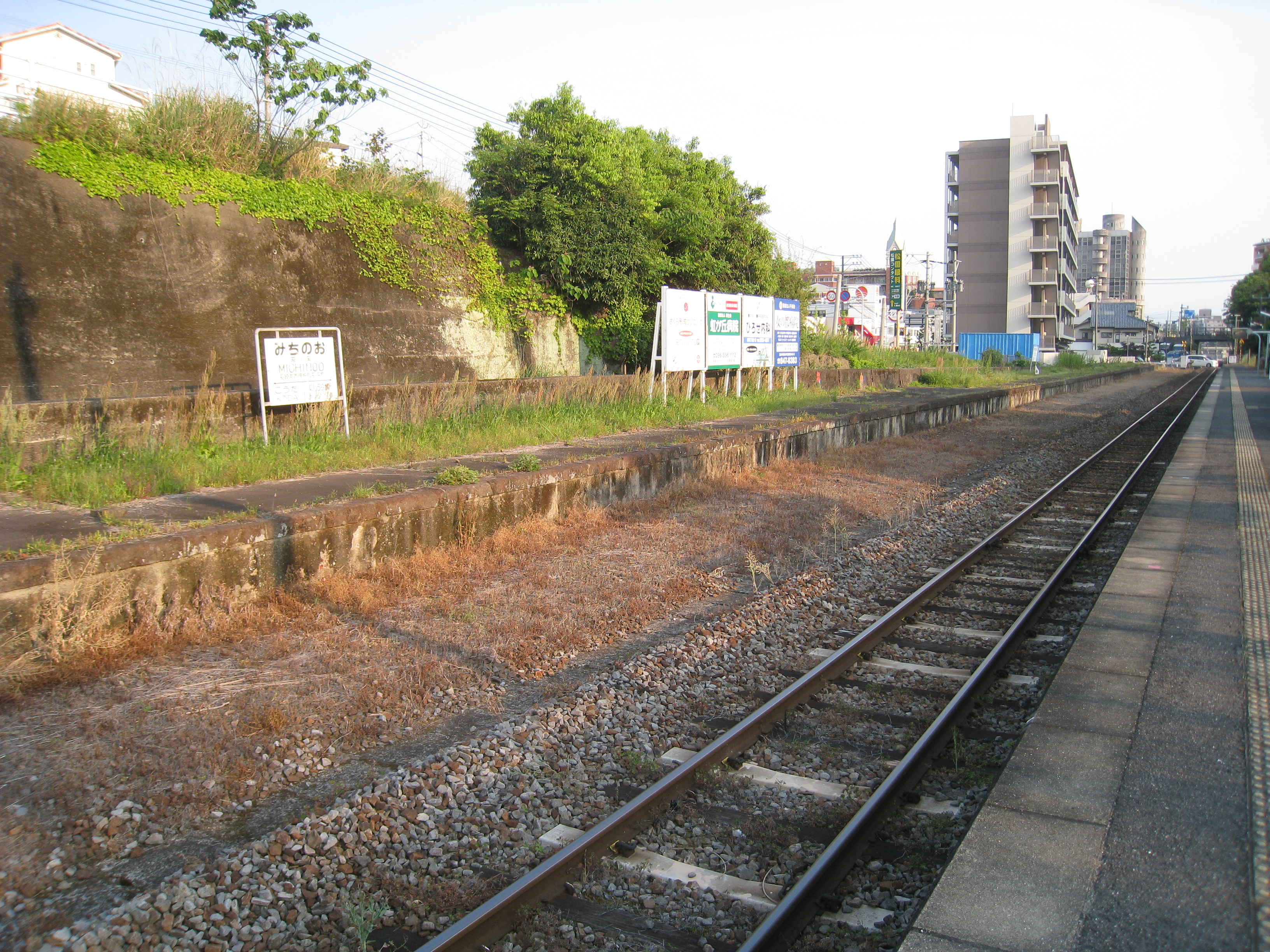 長崎県道ノ尾駅旧ホーム